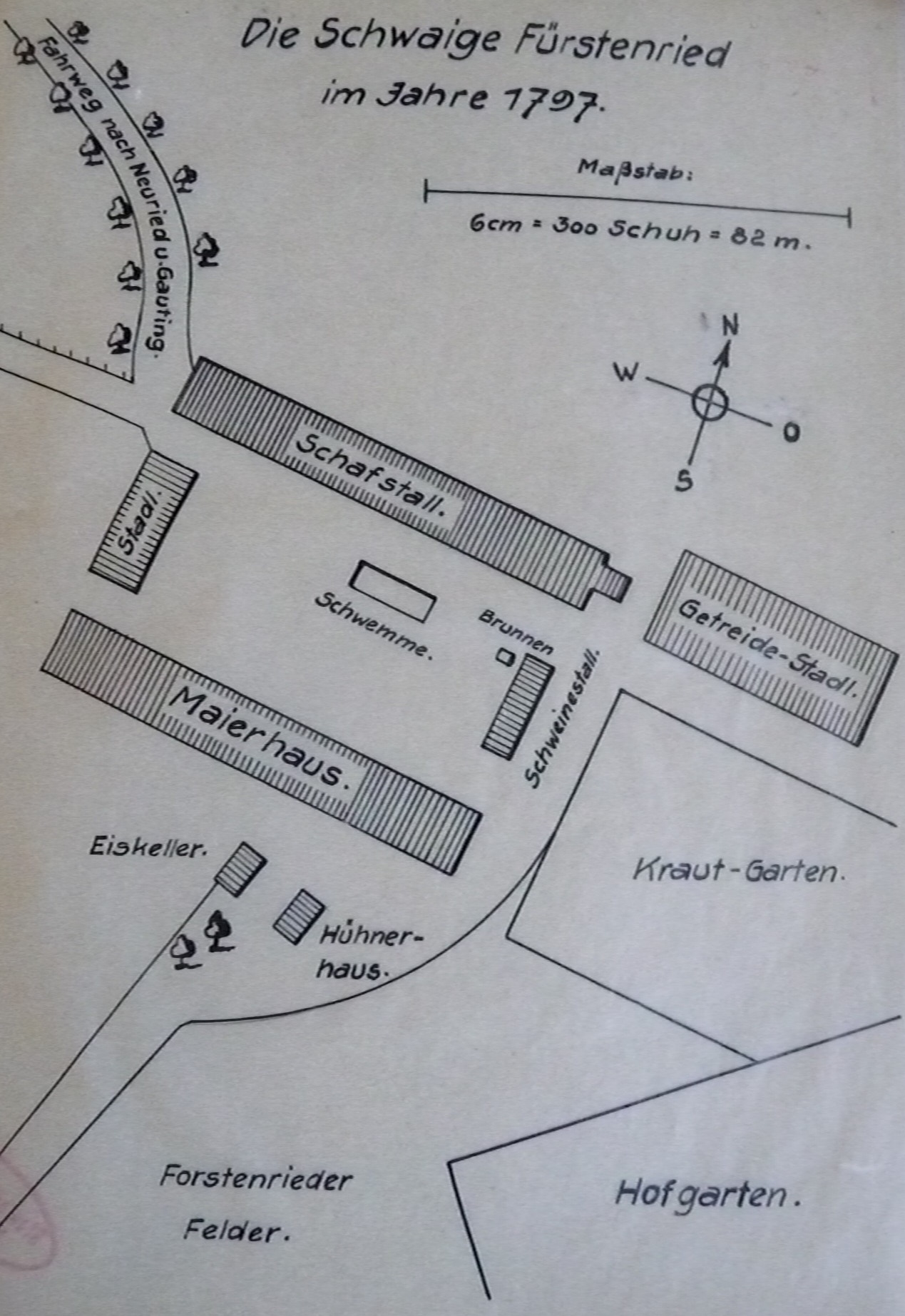 Schwaigbetrieb von Schloss Fürstenried aus dem Jahr 1797.